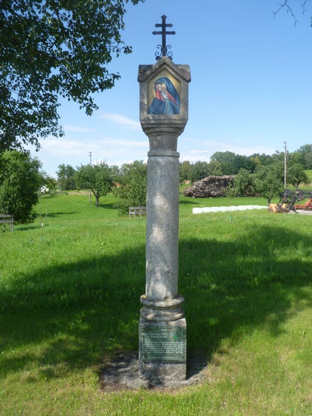 Katsdorf Neuwirth Pestsäule